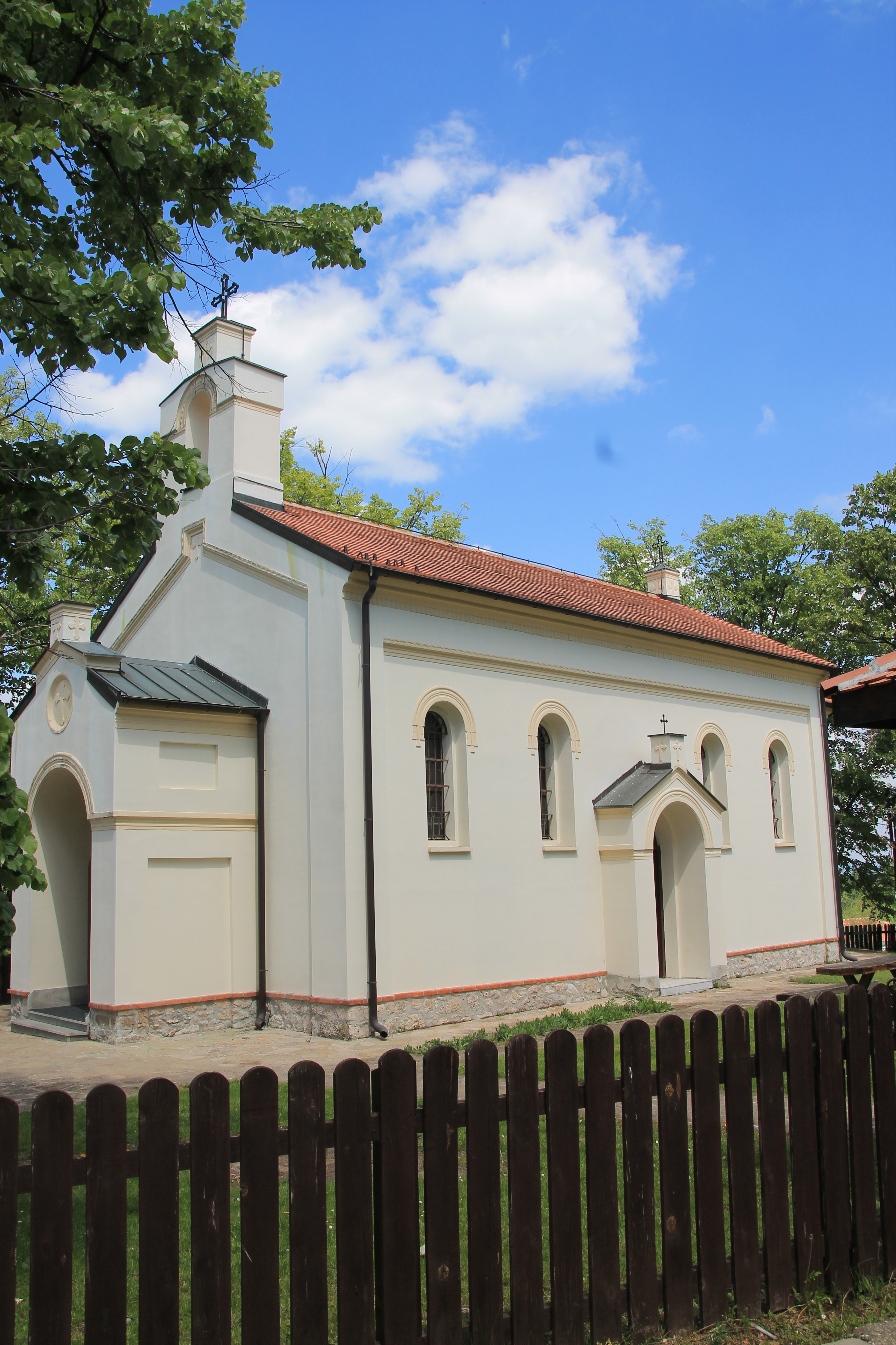 Znamenito mesto Orašac